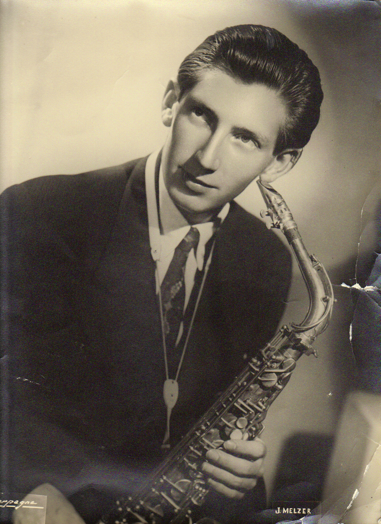 Hudebník Jacques Melzer